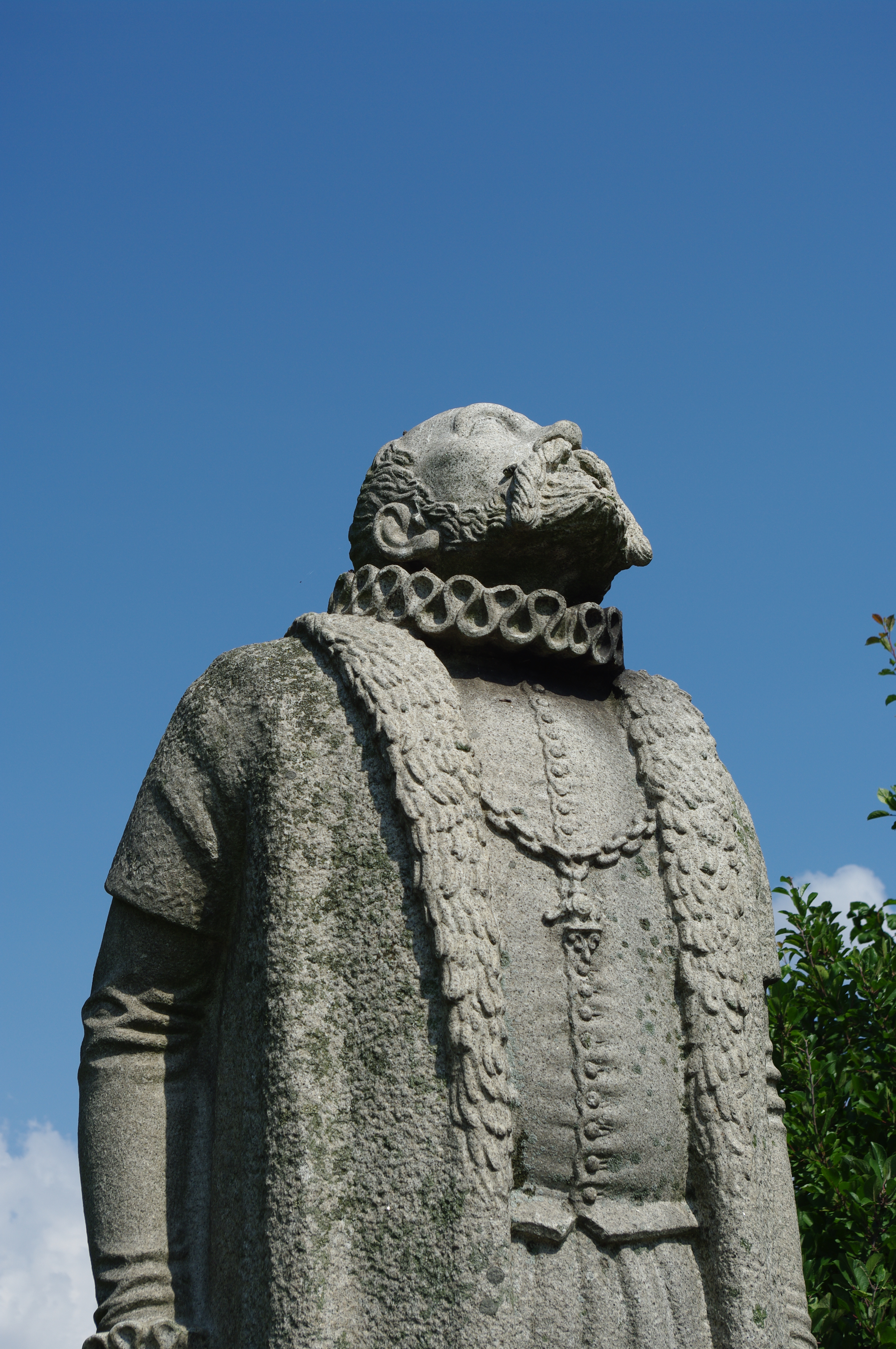 Tycho Brahe statue on the island of Ven in Sweden.